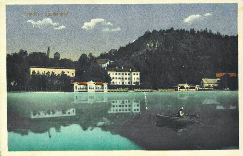 Hotel Louisenbad na Bledu. Hotel je bil zgrajen sredi 19. stoletja.